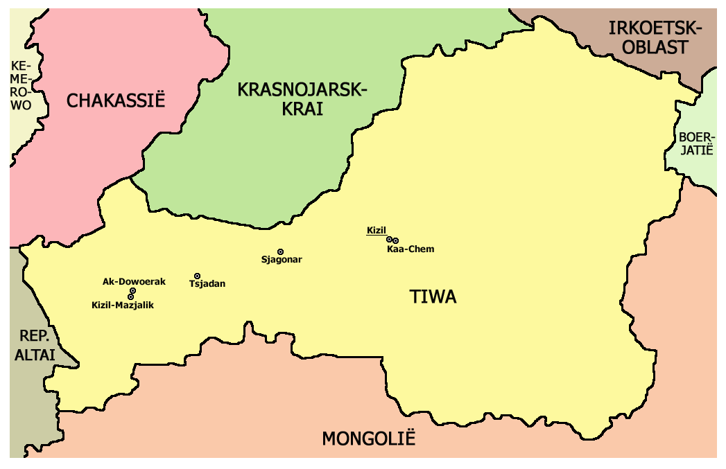 Kaart van Tiwa in Rusland